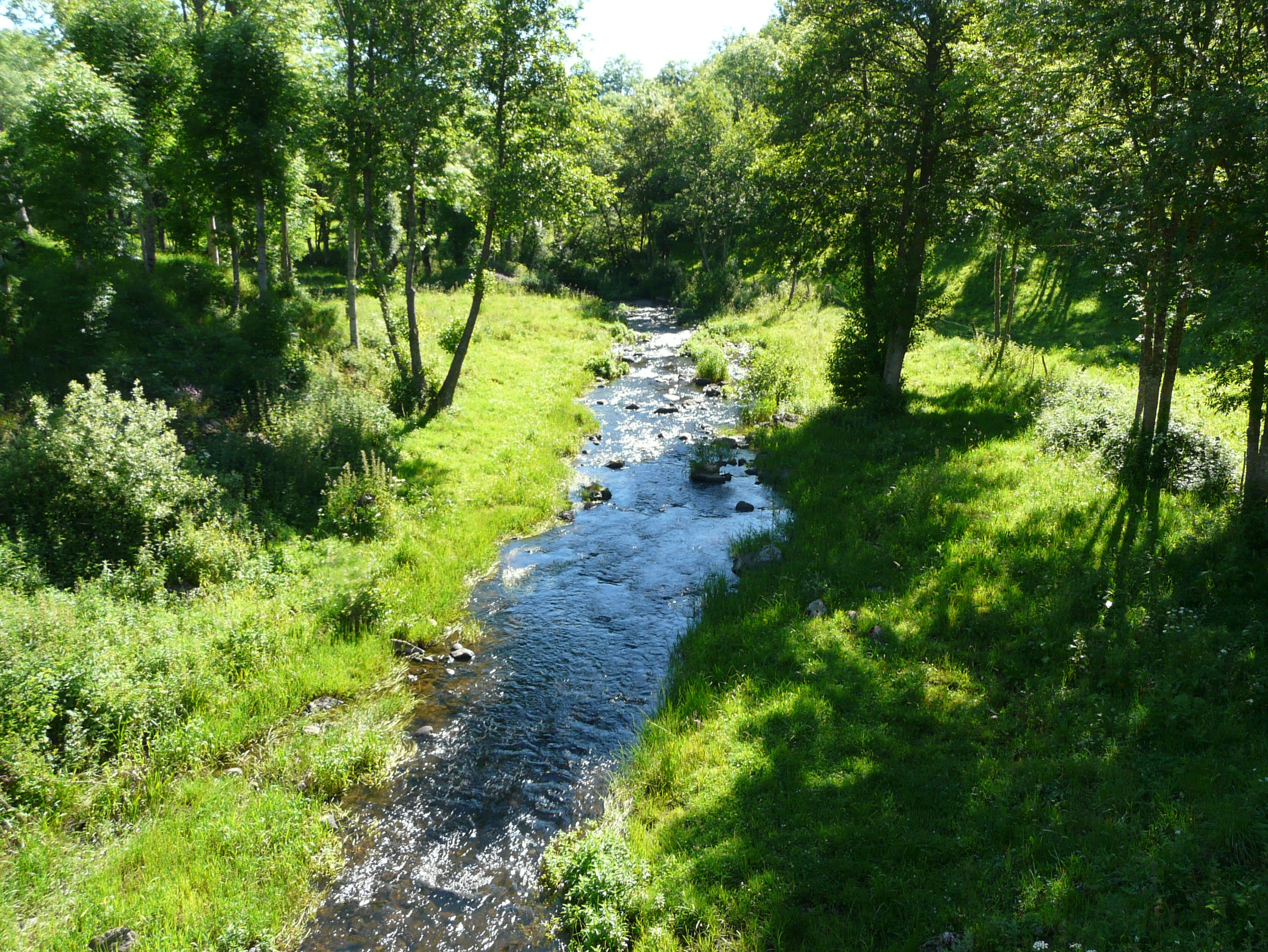 Le ruisseau de Jurol en aval du pont de la route départementale 890, Les Ternes, Cantal, France.